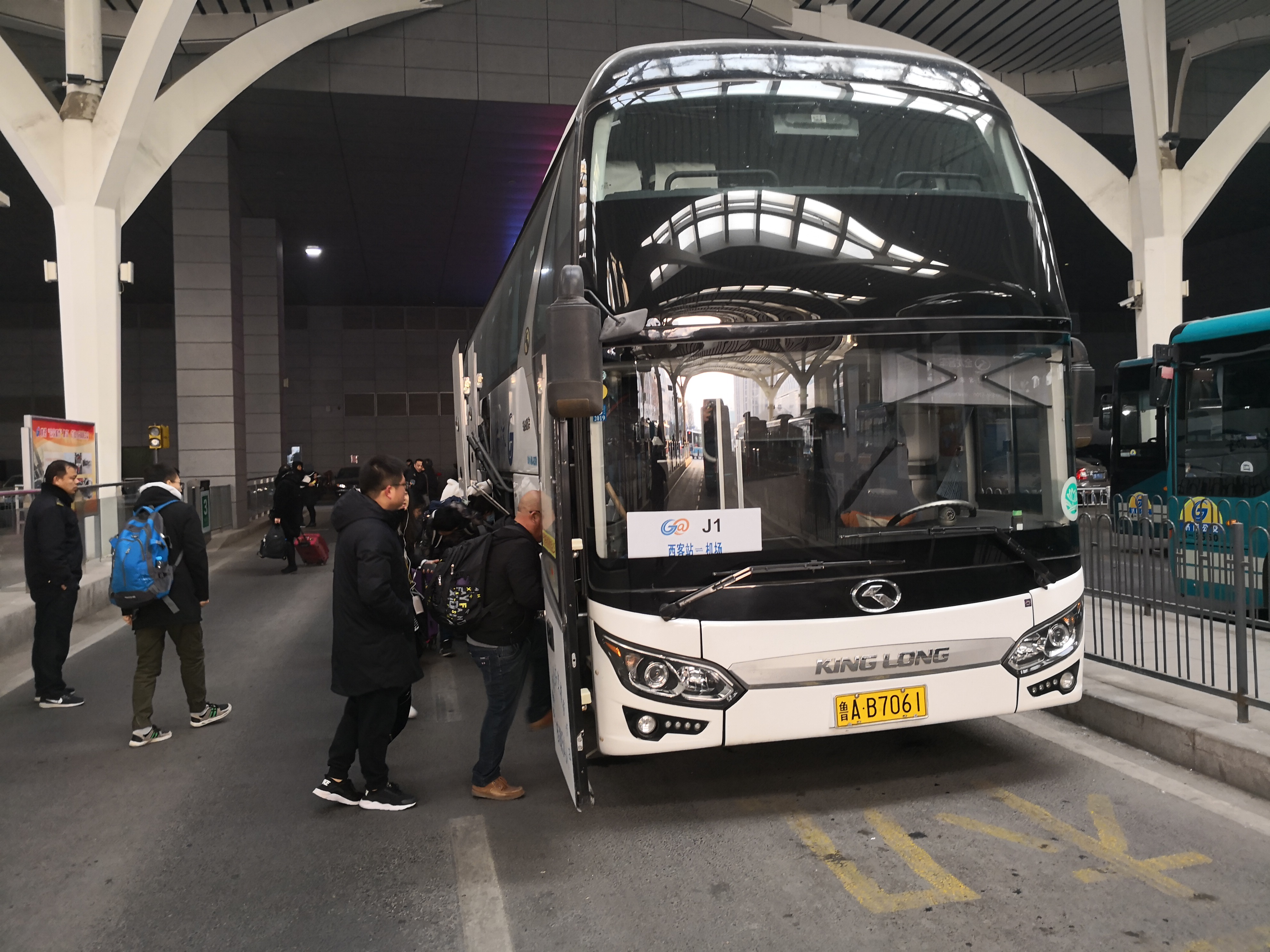 济南机场巴士3号线